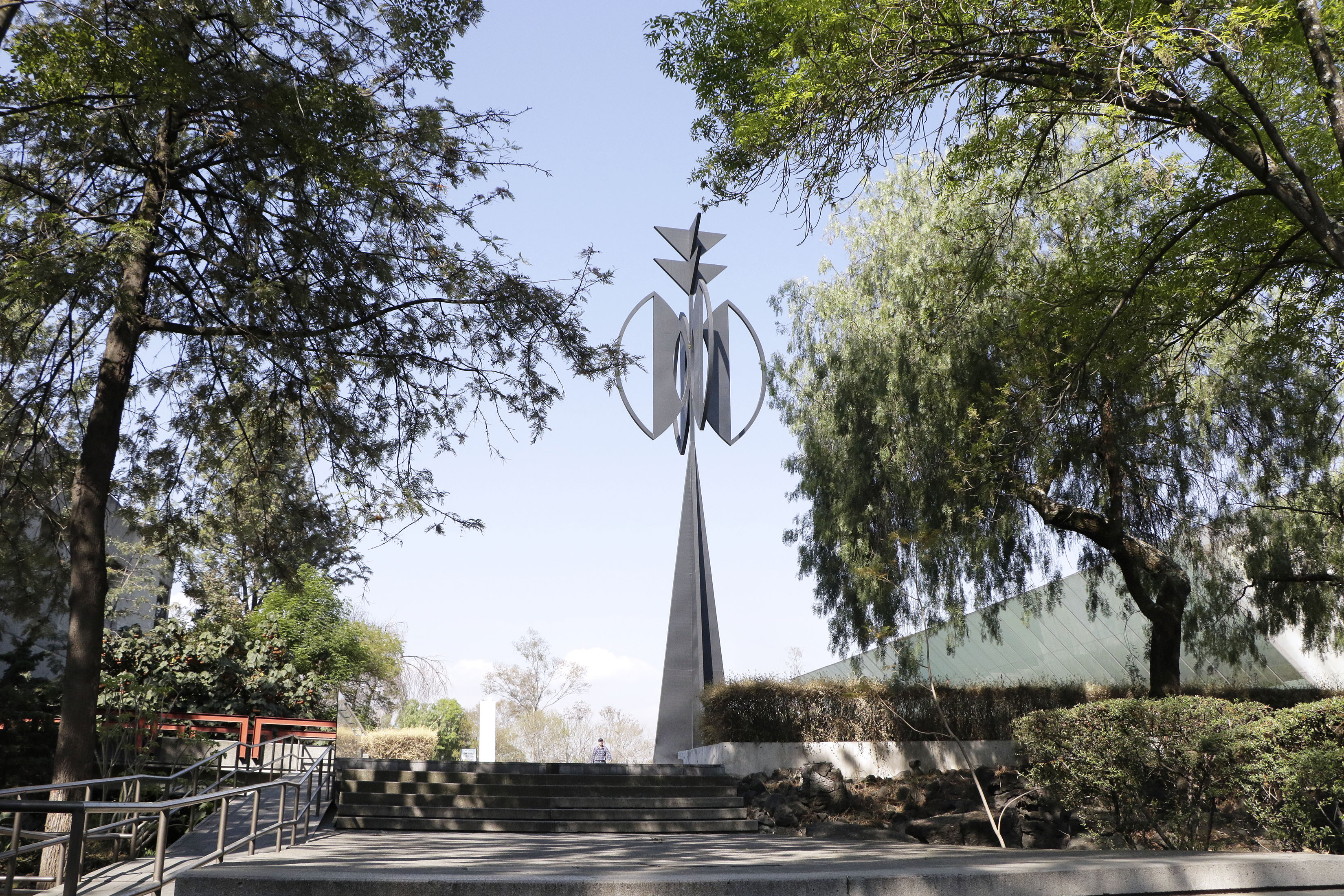 Lunes 11 de febrero de 2019. La Espiga, escultura de Rufino Tamayo ubicada a un costado del Museo Universitario Arte Contemporáneo de la UNAM, en la Ciudad de México. Fotografía: Tania Victoria / Secretaría de Cultura de la Ciudad de México